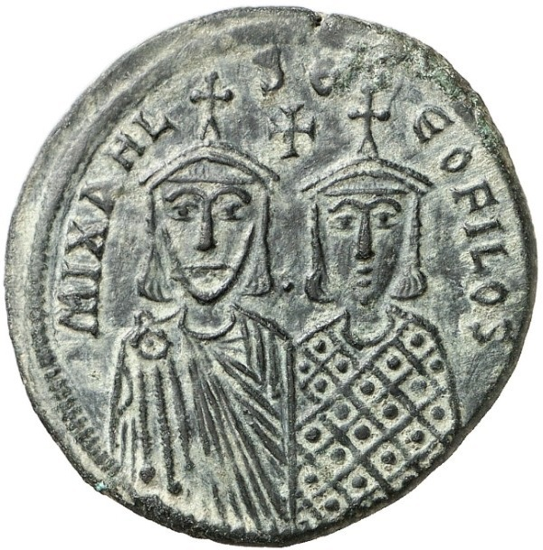 Michael II. der Amorier, 820 - 829 n. Chr. Follis (40 Nummi) Mzst. Konstantin­opel. Inschrift: mIXAHL S Θ-EOFILOS, bekrönte Büsten von Michael II. mit Loros u. sein Sohn Theophilos mit Chlamys, darüber Kreuz, zwischen ihnen ein Punkt.